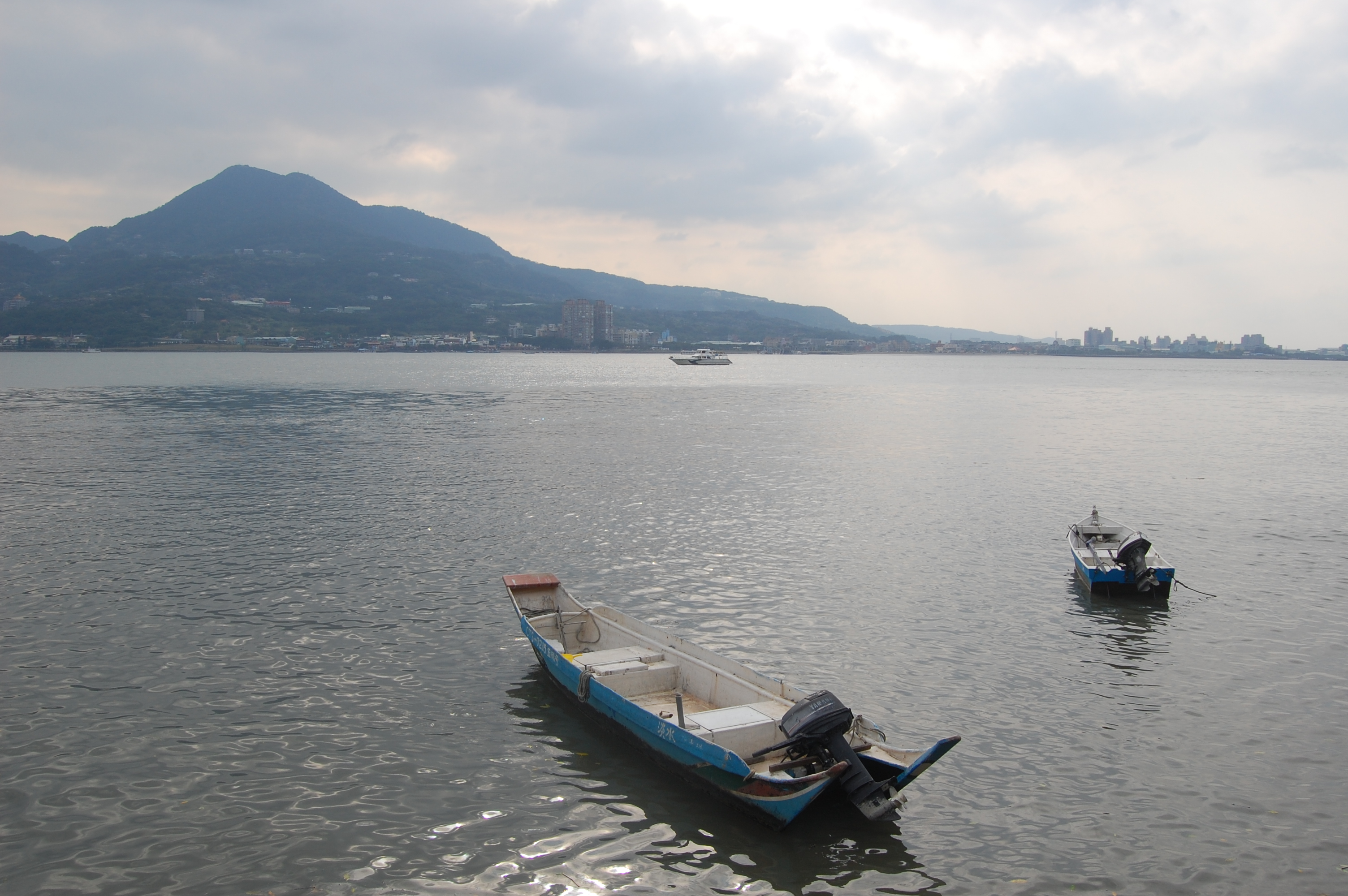 Danshui Riverside